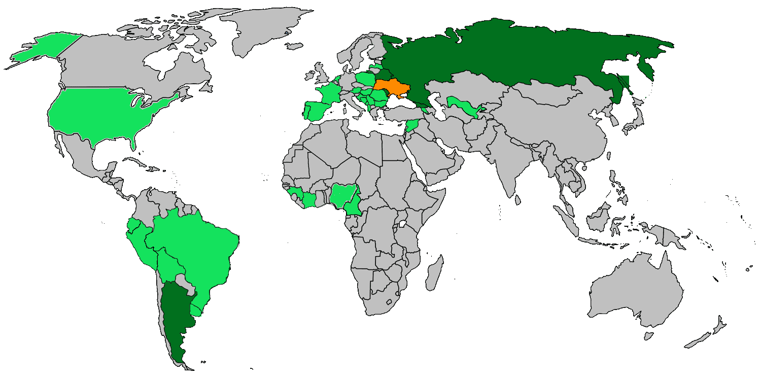 Карта країн, з яких походять футболісти-легіонери ФК Чорноморець Одеса